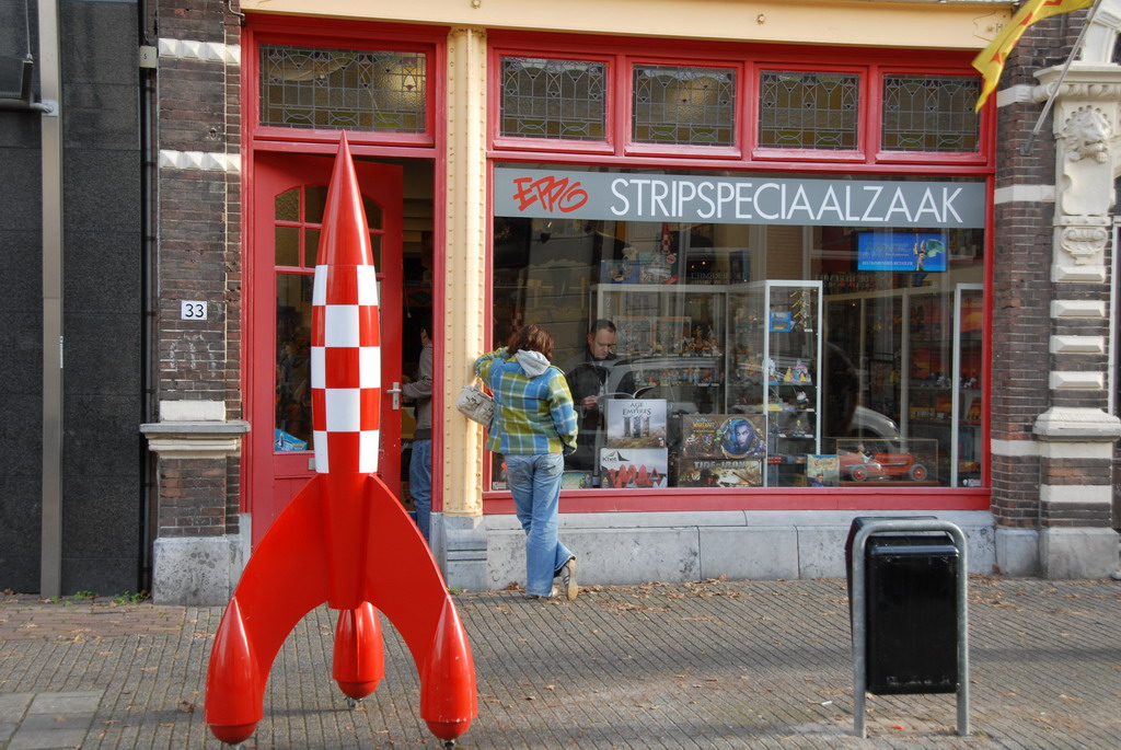 Eppo Stripspeciaalzaak, Kleine Berg, Eindhoven.